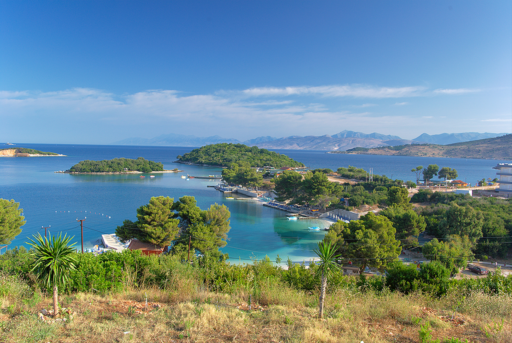 Ksamil - Albania 07'2011